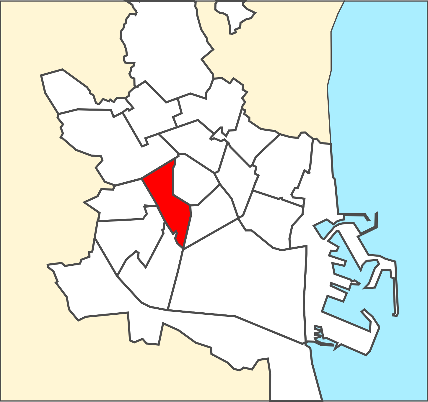 Districte de Extramurs.